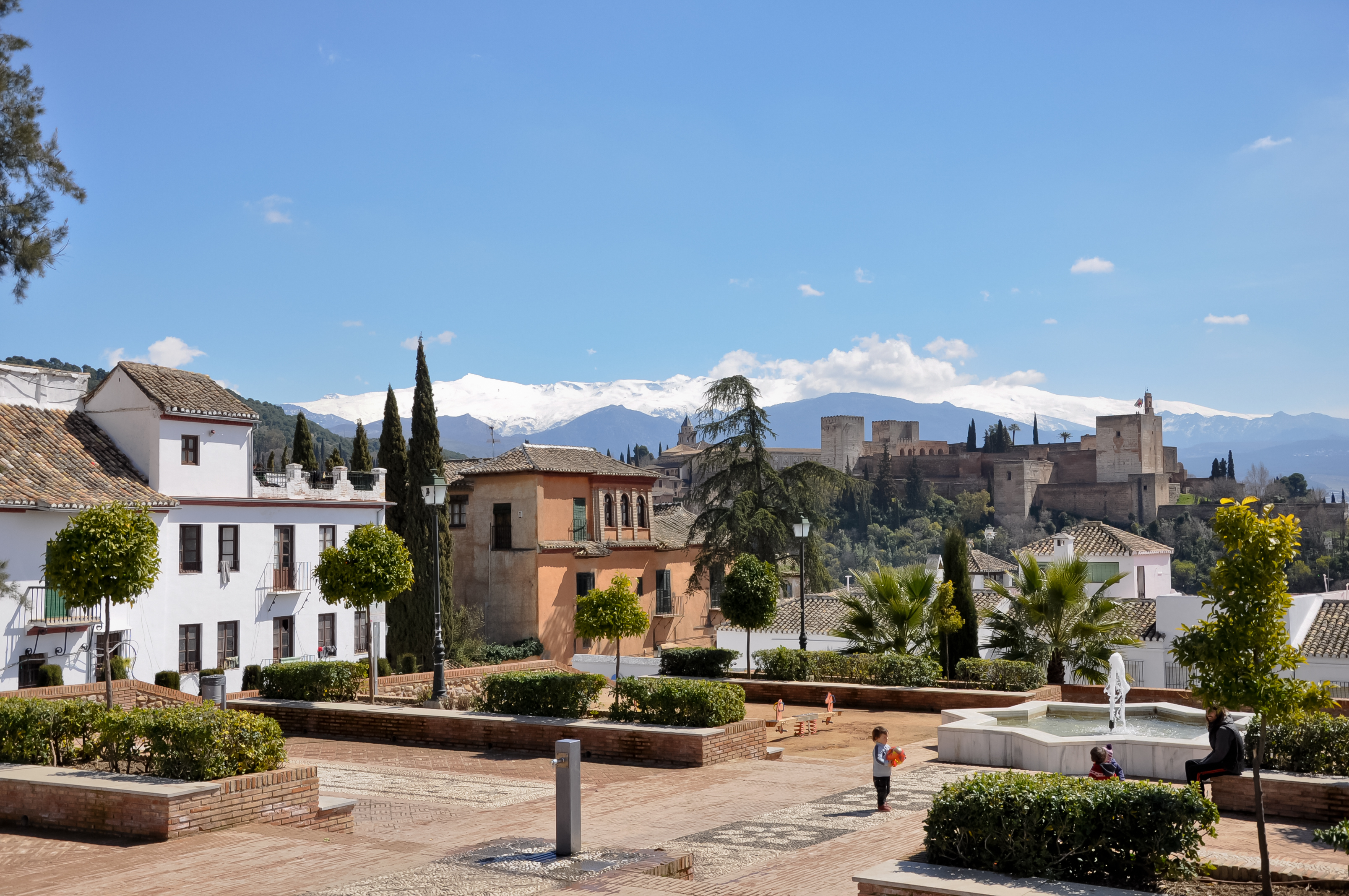 Huerto del Carlos, Albaicín, Granada, Spanje.